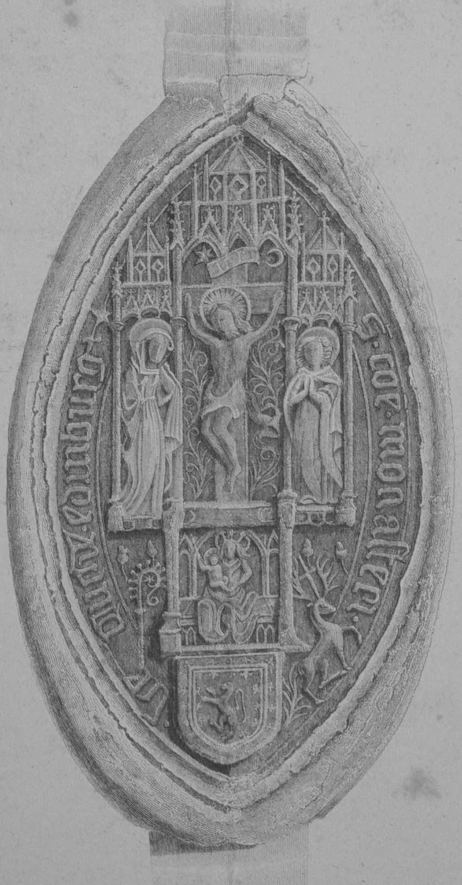 vue du sceau commun de l'abbaye de la Sainte Croix d'Ecosse lors de Robert Stuart vers 1555.